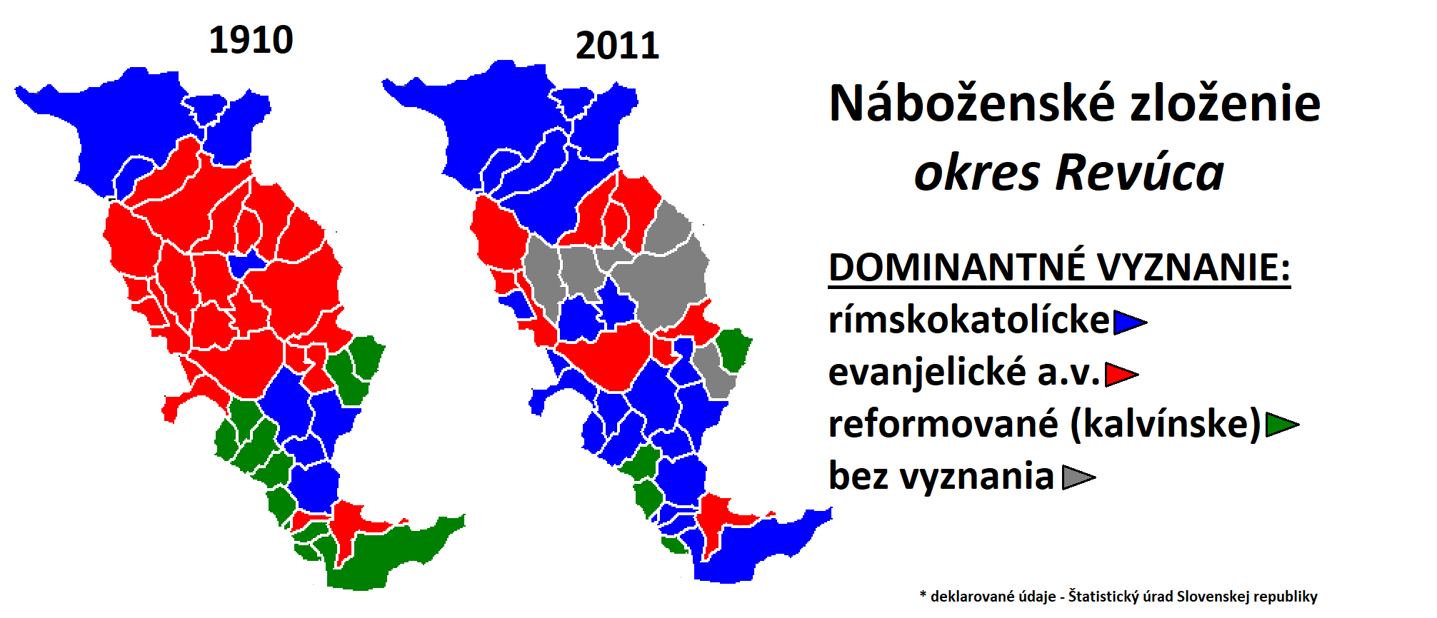 Religious structure of Revúca district in Slovakia.